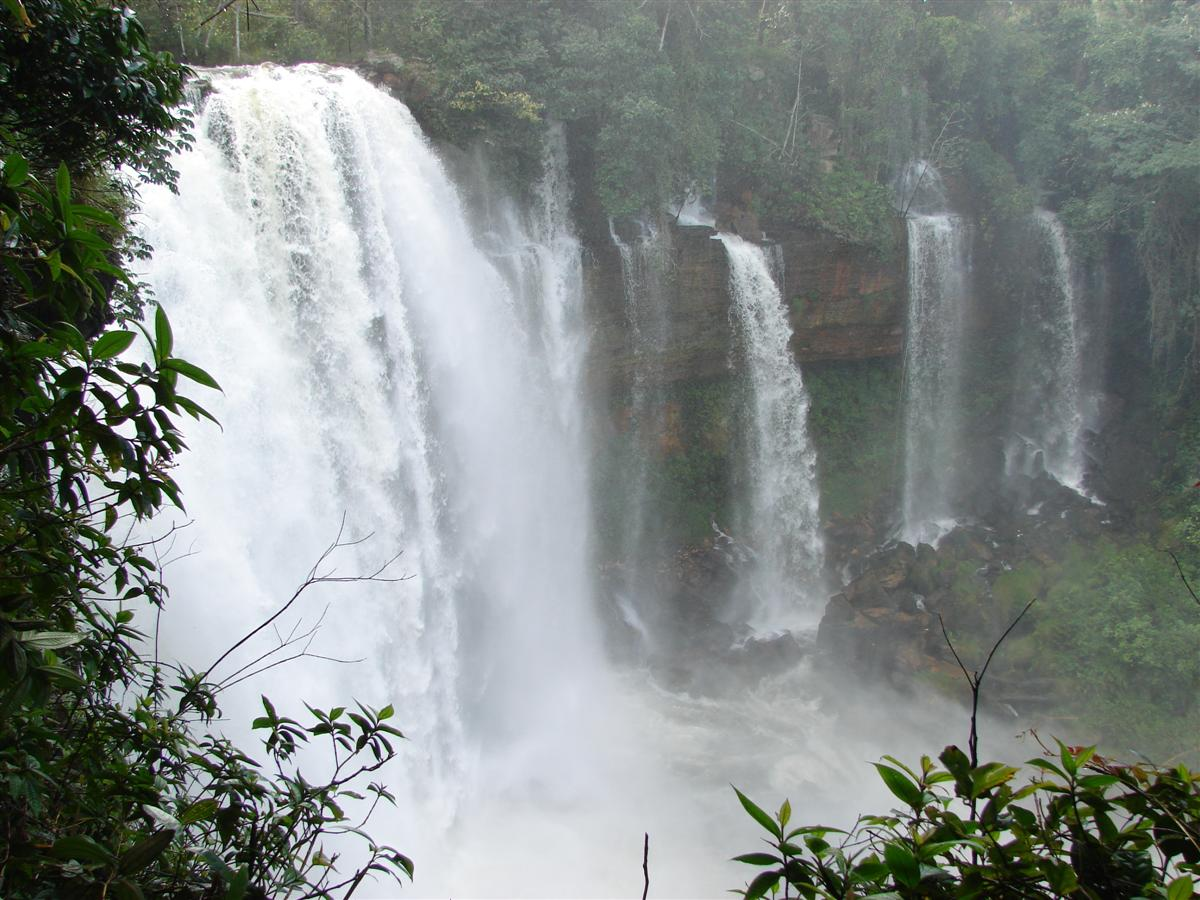 Cachoeira Acaba Vida no Rio de Janeiro em Luis Eduardo Magalhães, BA